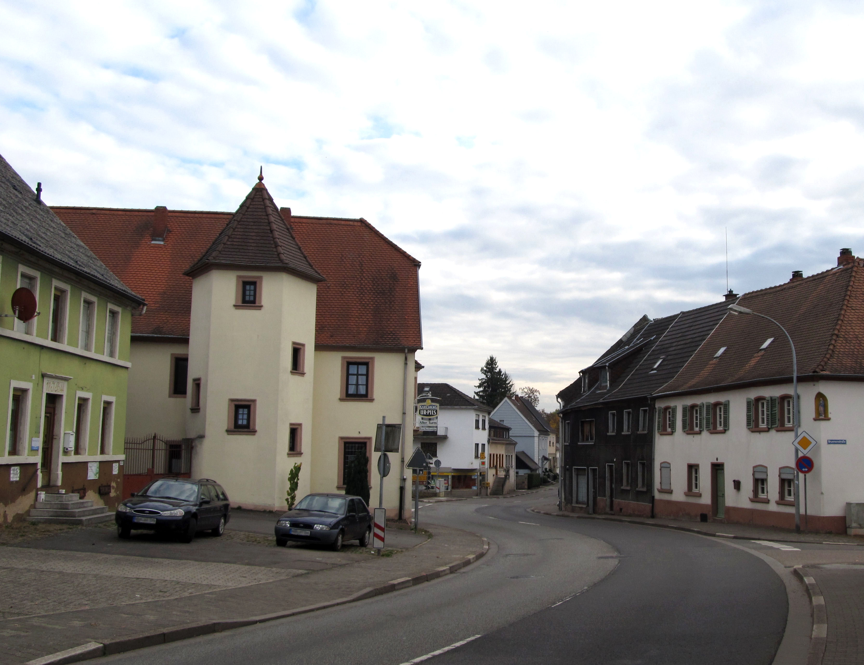 Lautzkirchen Ortsmitte mit "Altem Turm"